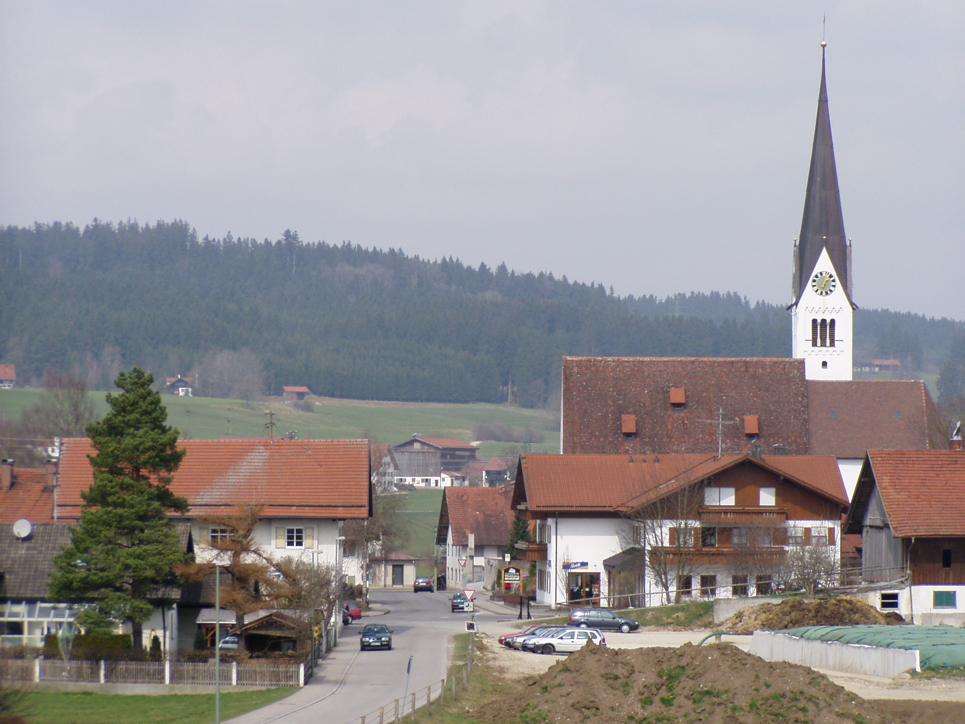 Ruderatshofen